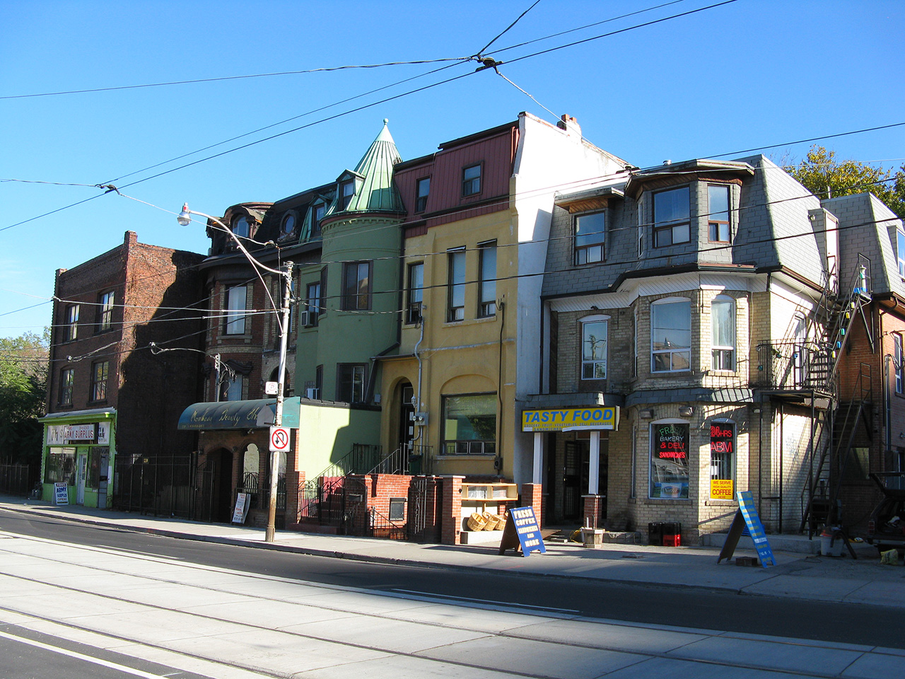 Dundas Street between Pembroke and George Streets. Garden district in Toronto, Ontario, Canada.